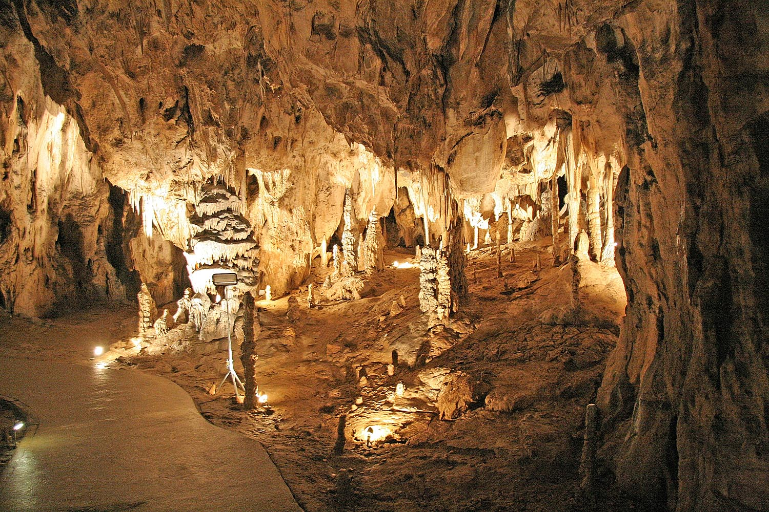 Sloupskosošůvské jeskyně - Eliščina síň